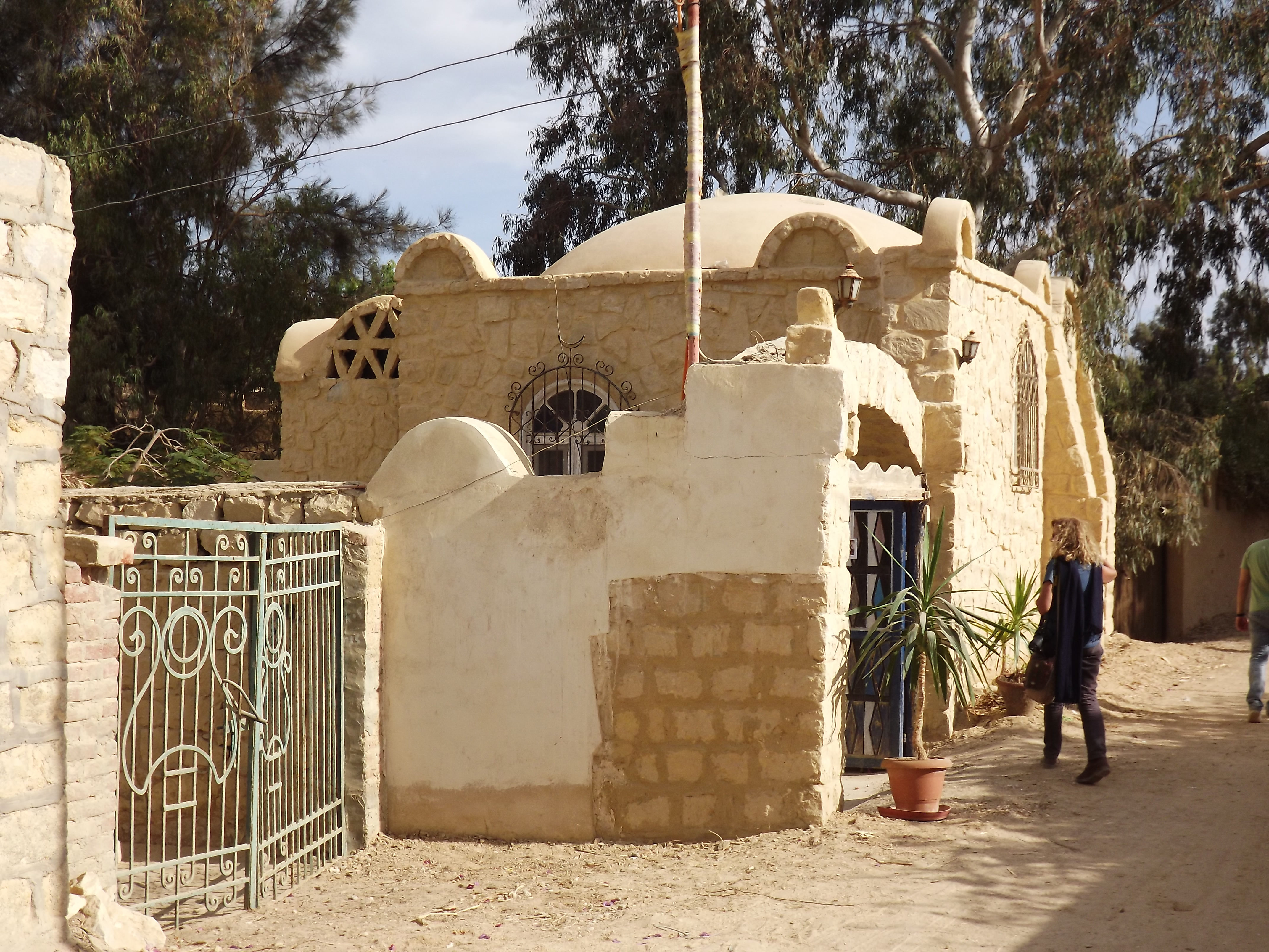 محمية قارون - قرية تونس- الفيوم